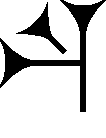 Cuneiform sign